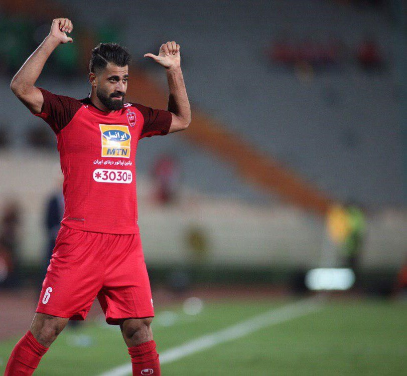 پرسپولیس - صنعت نفت آبادان